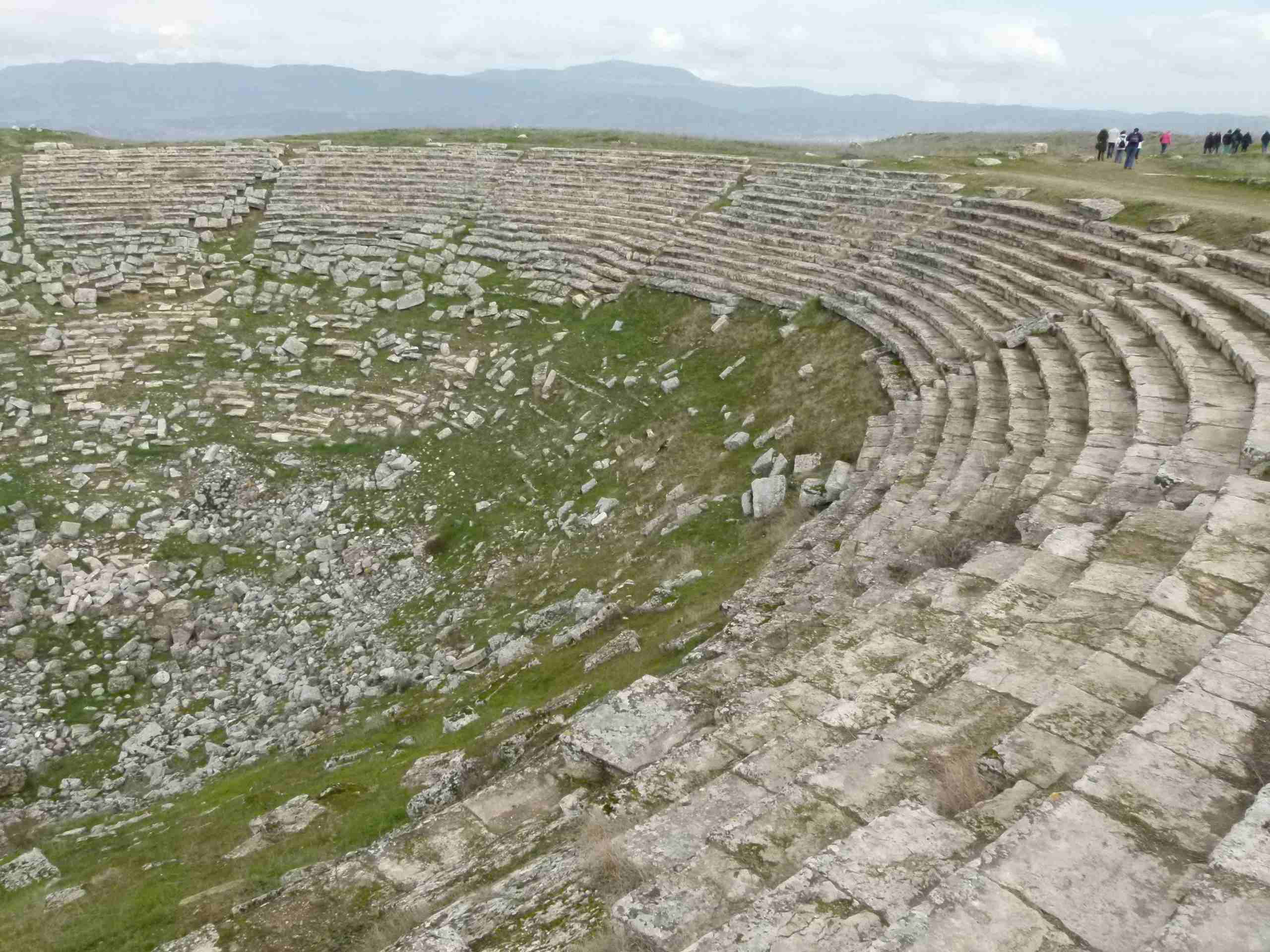 Das östliche Theater in Laodikeia am Lykos / Türkei